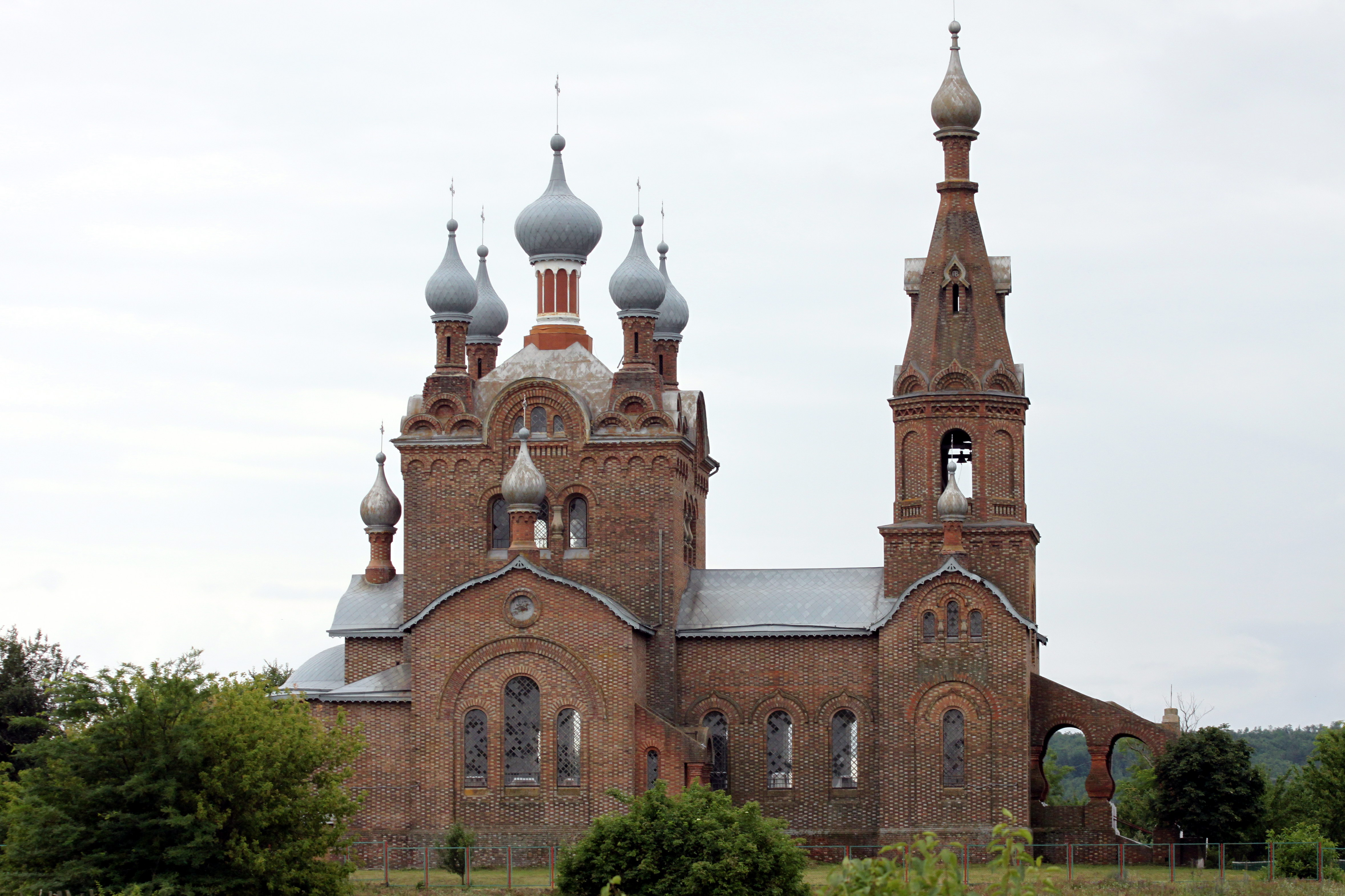 Церква Покровська, с. Покровка, Любашівський район